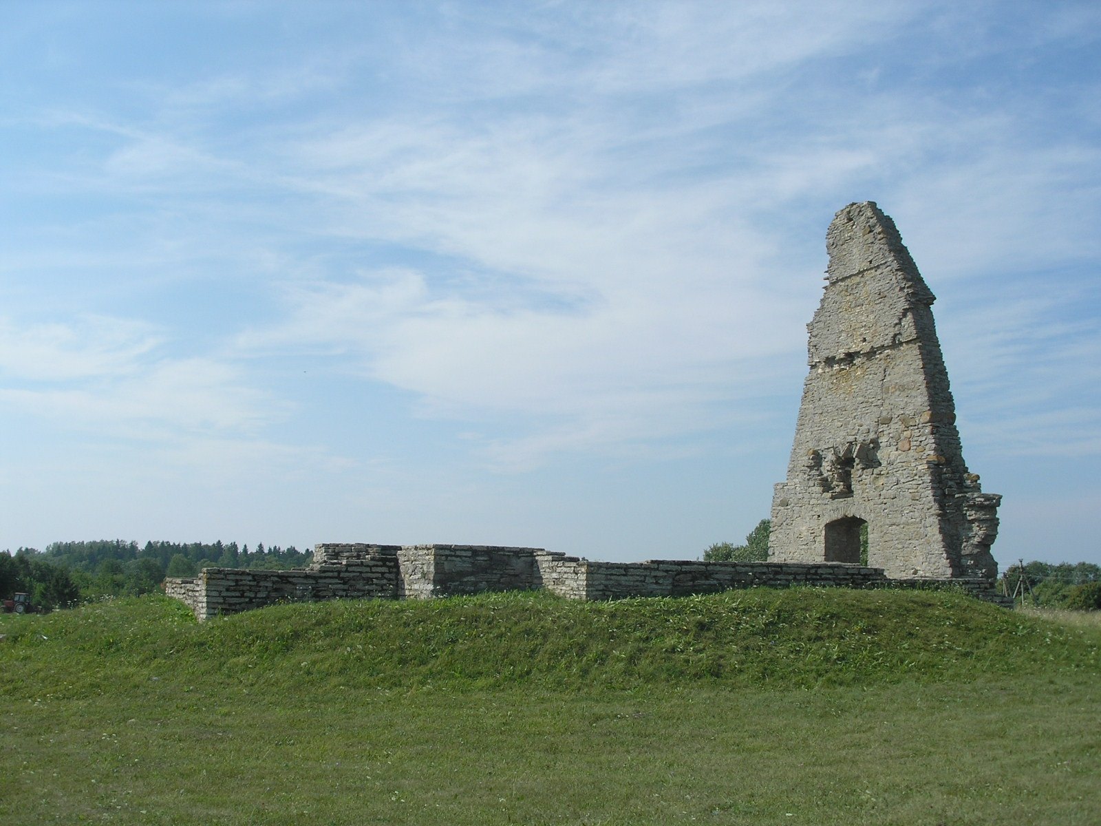 Maarja kabeli varemed Viru-Nigulas.